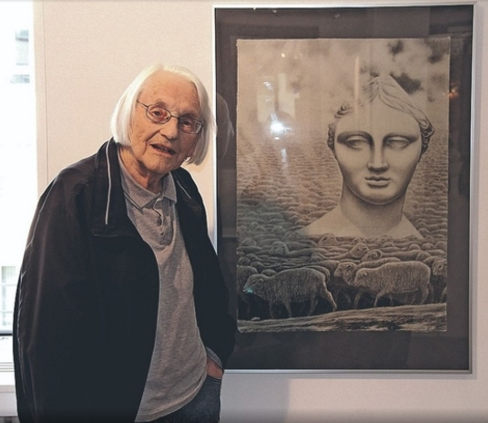 Arthur Loosli mit 92 Jahren anlässlich der Kunst-Ausstellung in Thun